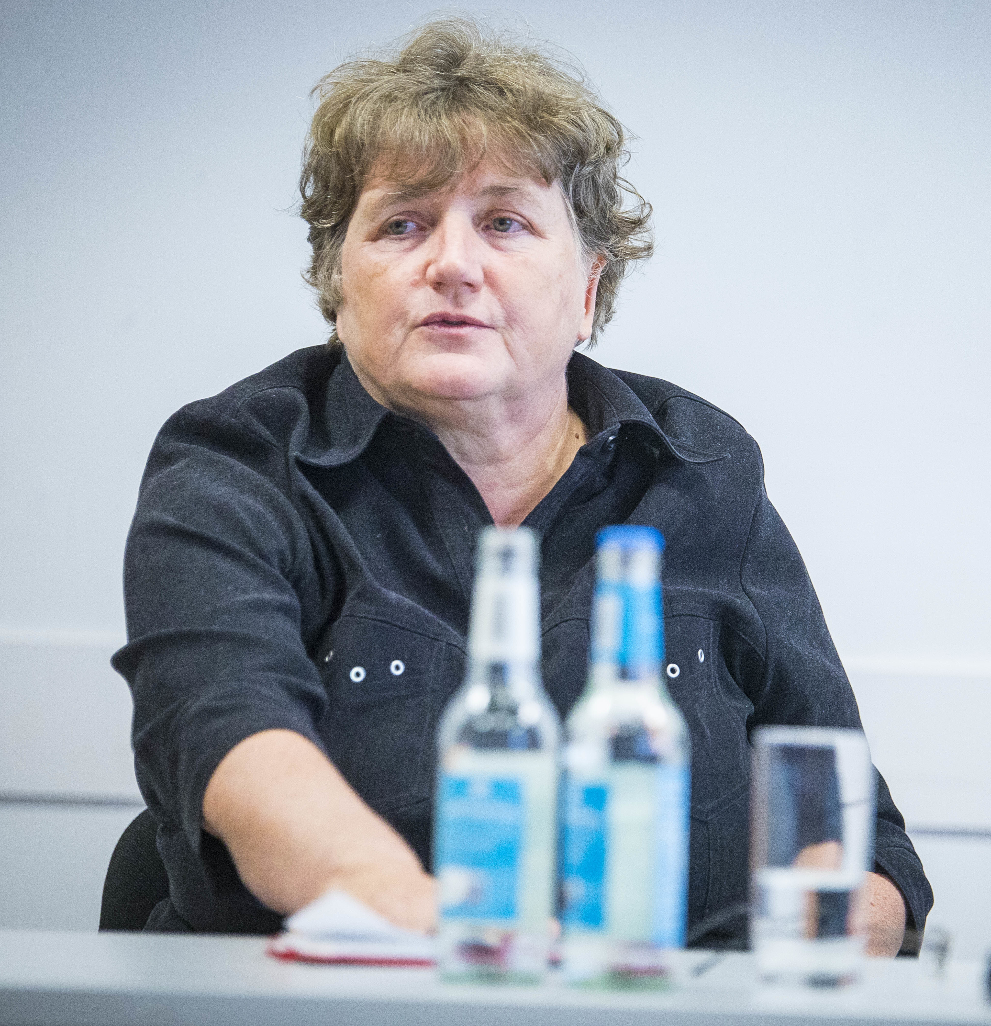 Podiumsdiskussion "Bio nur für die Mittelklasse? Wie sich ein gutes Leben verallgemeinern lässt." Mit Kirsten Tackmann (MdB, DIE LINKE), Jürgen Maier (Geschäftsführer Forum Umwelt und Entwicklung "WIR HABEN ES SATT" und Steffen Kühne (Rosa-Luxemburg-Stiftung)